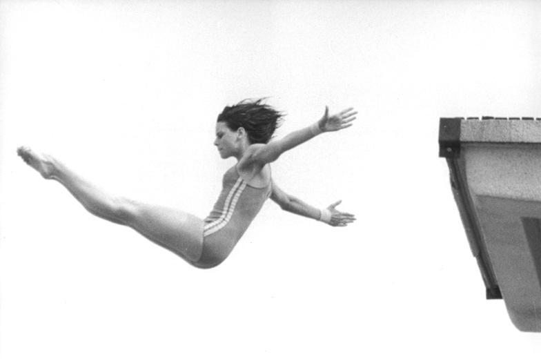 Martina Jäschke ADN-ZB Lehmann 18.6.78 Leipzig: Bei den DDR-Meisterschaften im Wasserspringen endete am 17.6. das Turmspringen der Damen mit einer Überraschung. Mit 587,73 Punkten gewann Martina Jäschke vom SC Chemie Halle die Konkurrenz mit einem Vorsprung von mehr als 20 Punkten vor Kerstin Krause vom TSC Berlin. Die 18jähllenserin war bereits am 15.6. Dritte bei den DDR-Meisterschaften im Kunstspringen vom Dreimeterbrett geworden. -Foto von einem früheren Wettkampf- Abgebildete Personen: Jäschke, Martina: Turmspringerin, DDR